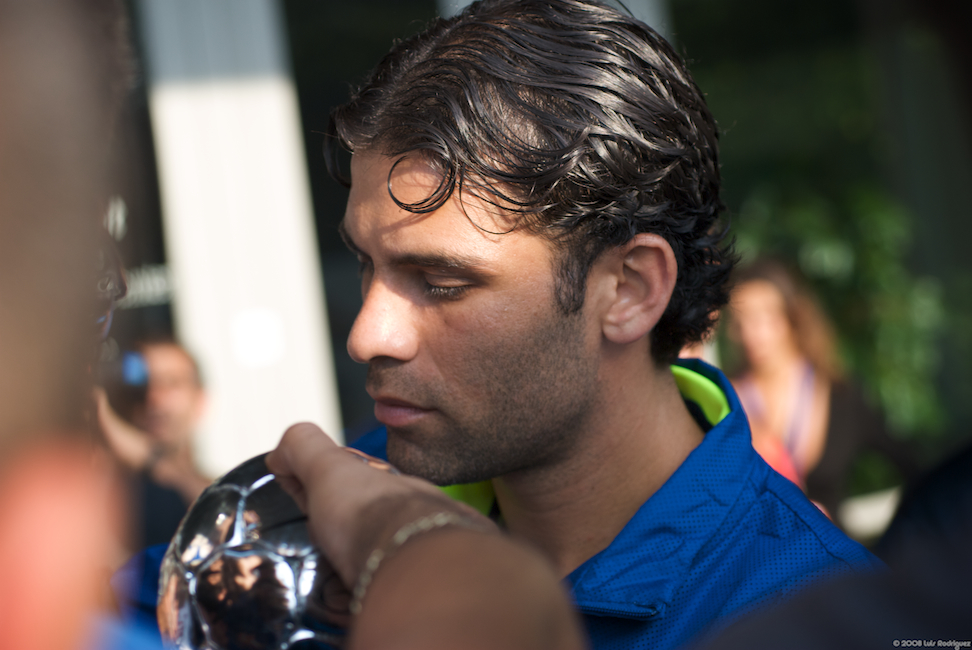 Rafael Márquez